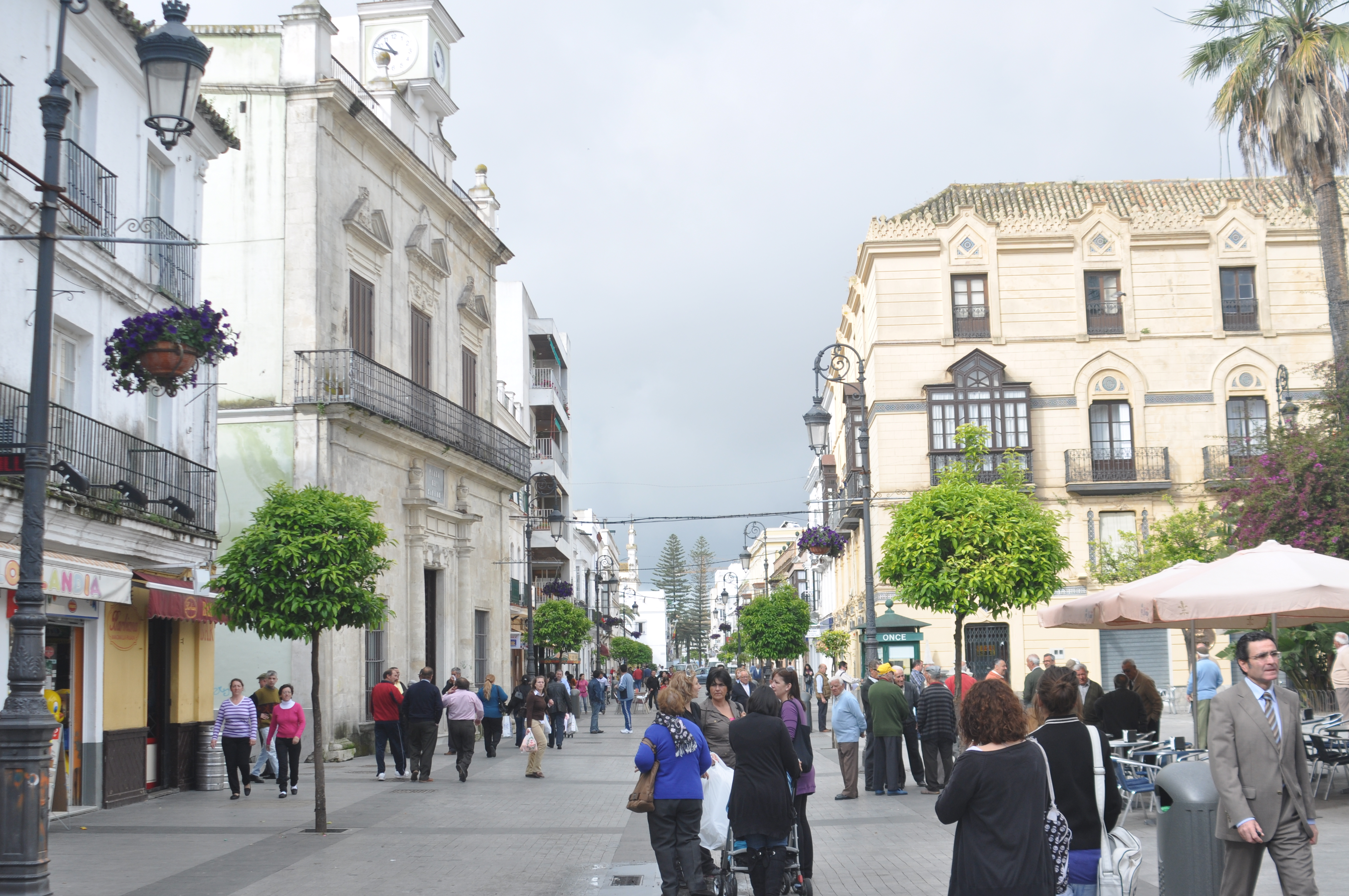 Calle Ancha de Sanlúcar de Barrameda.